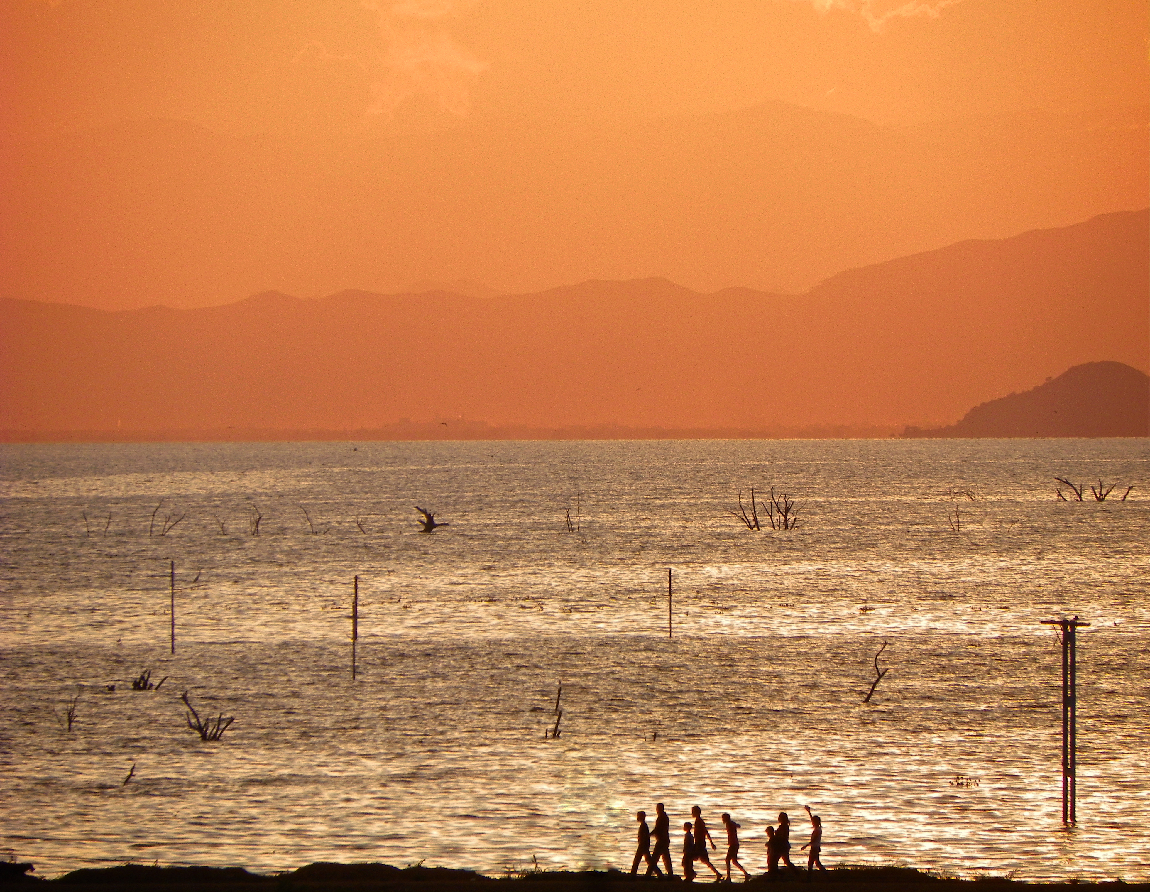 Personas caminando en las orillas del Lago de Valencia.